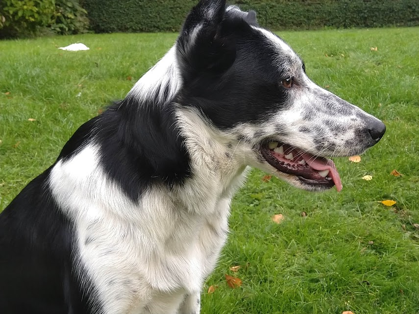 En 9-måneder gammel, korthåret border collie